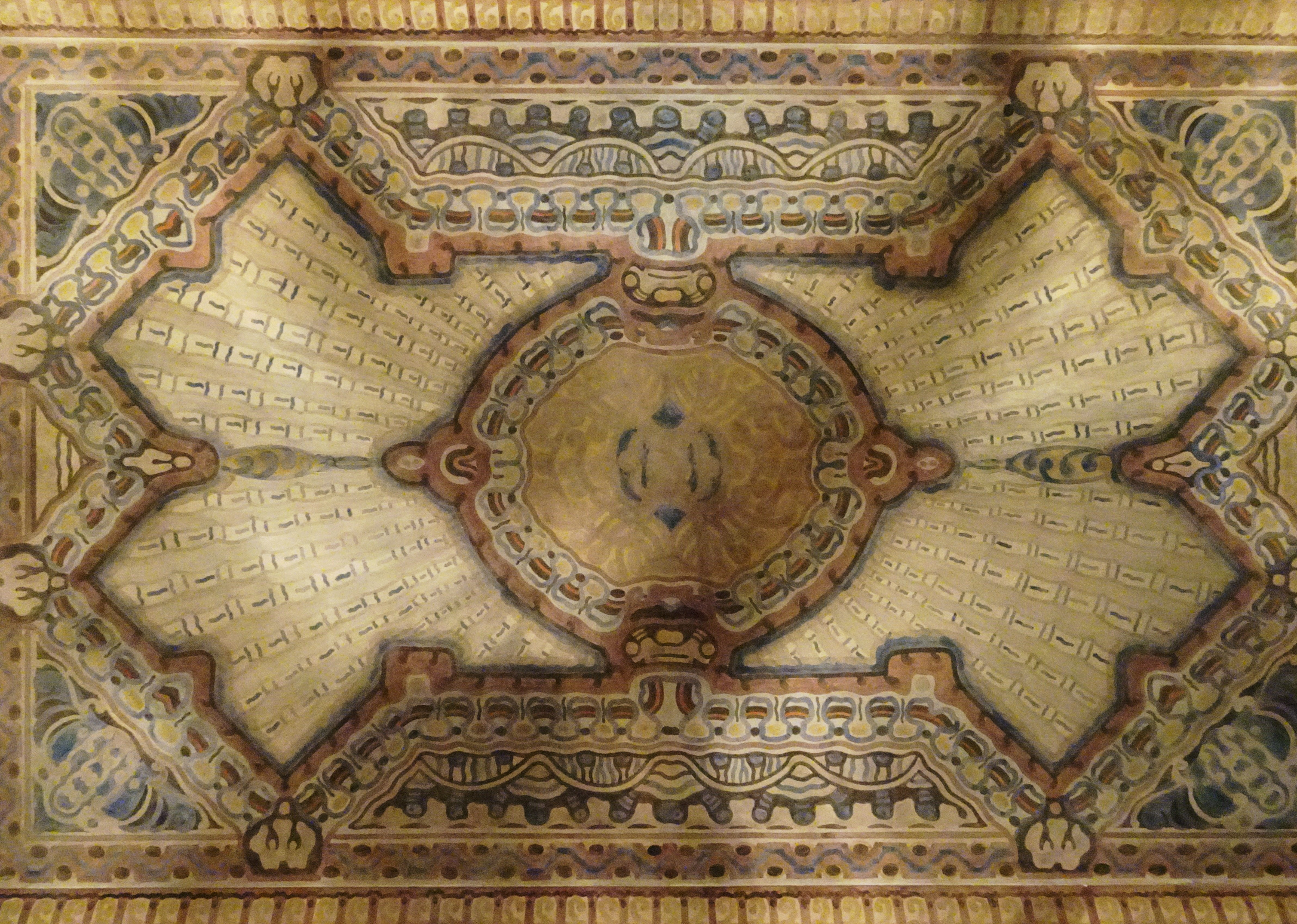 Riddaren 17, Riddargatan 7A, trapphus, takmålning